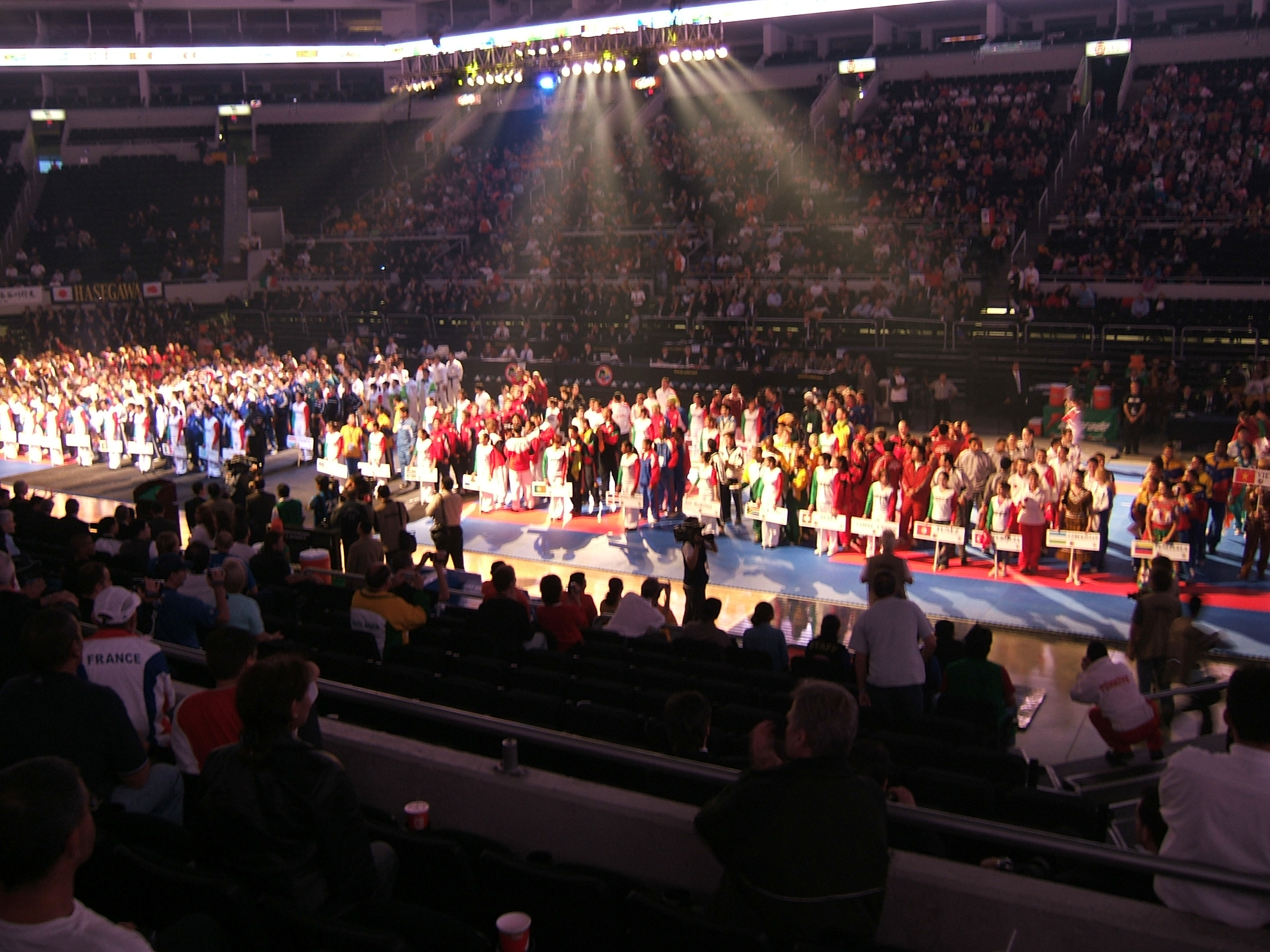 La présentation des délégations durant la cérémonie d'ouverture des championnats du monde de karaté à Monterrey en 2004